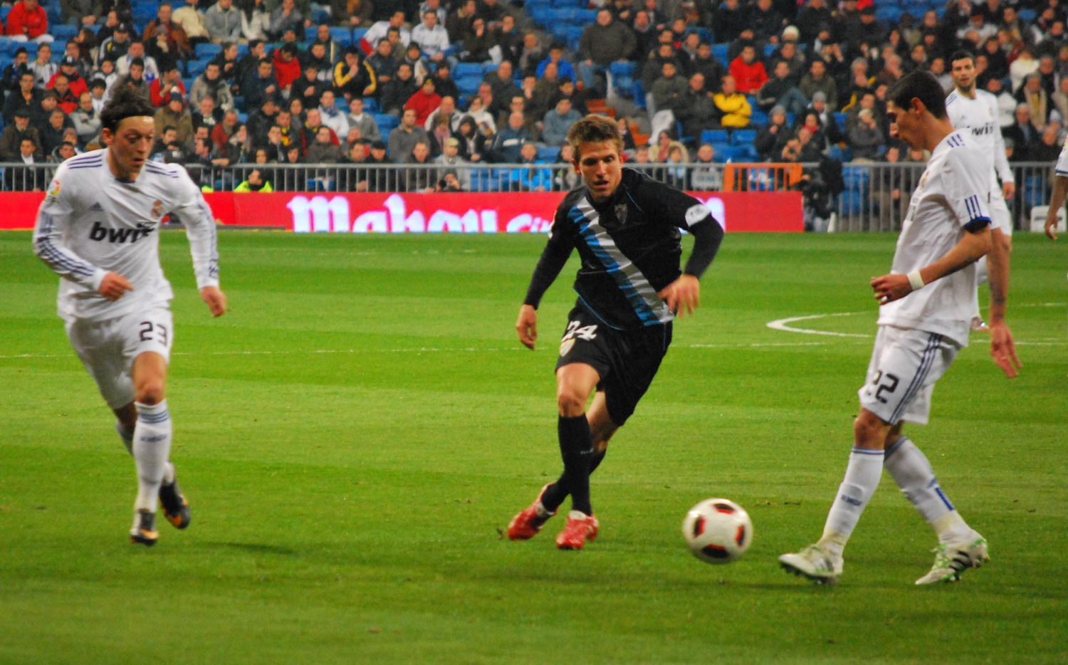 Pase de Di Maria a Ozil